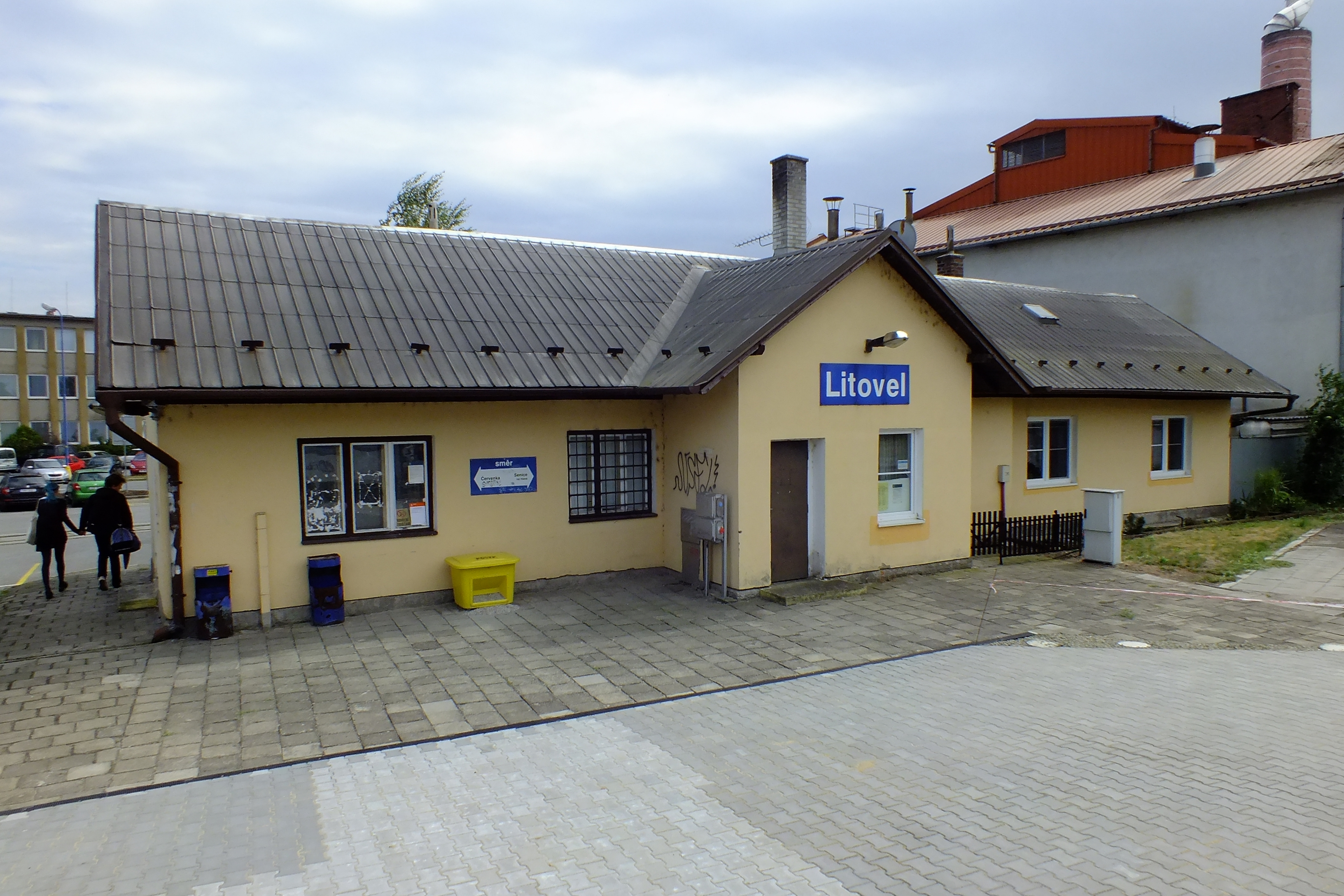 Staniční budova